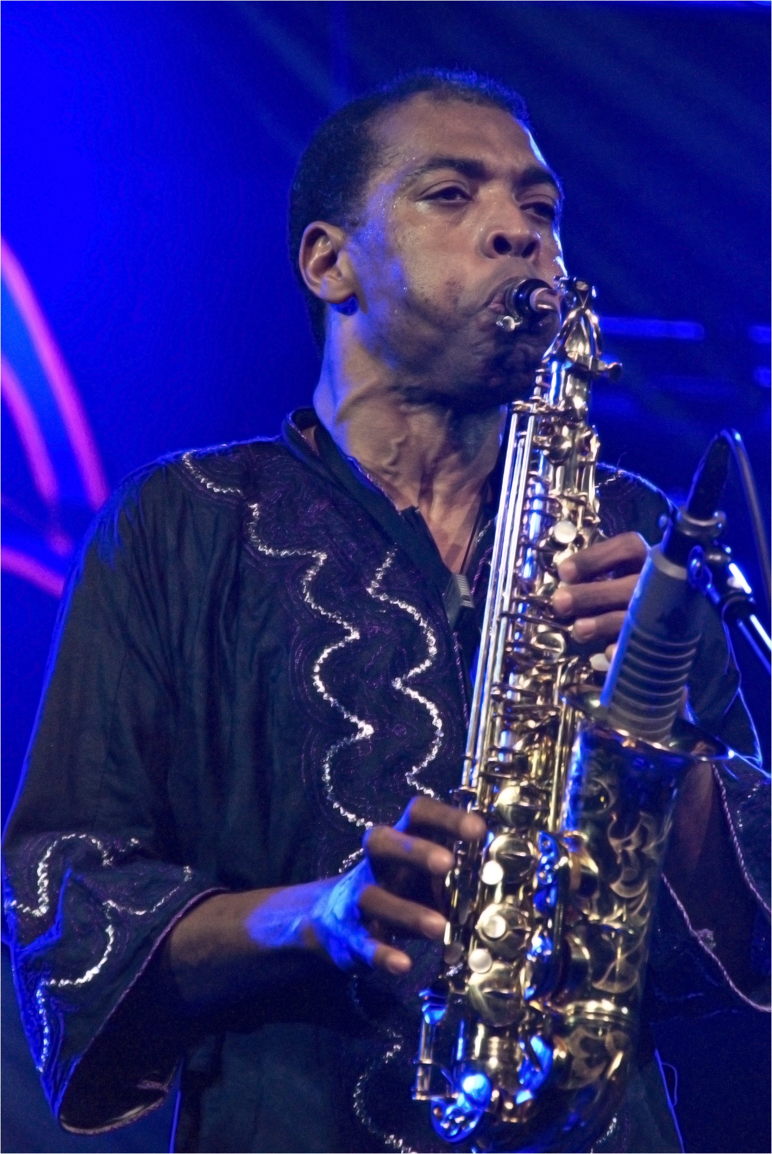 Femi Kuti es el primogénito de Fela Anikulapo-Kuti creador del afrobeat. Ha sido todo un placer poder verle en directo y tan cerca. Femi Kuti is the eldest son of Fela Anikulapo-Kuti pioneer of afrobeat. It has been a pleasure to hear and see him playing live.